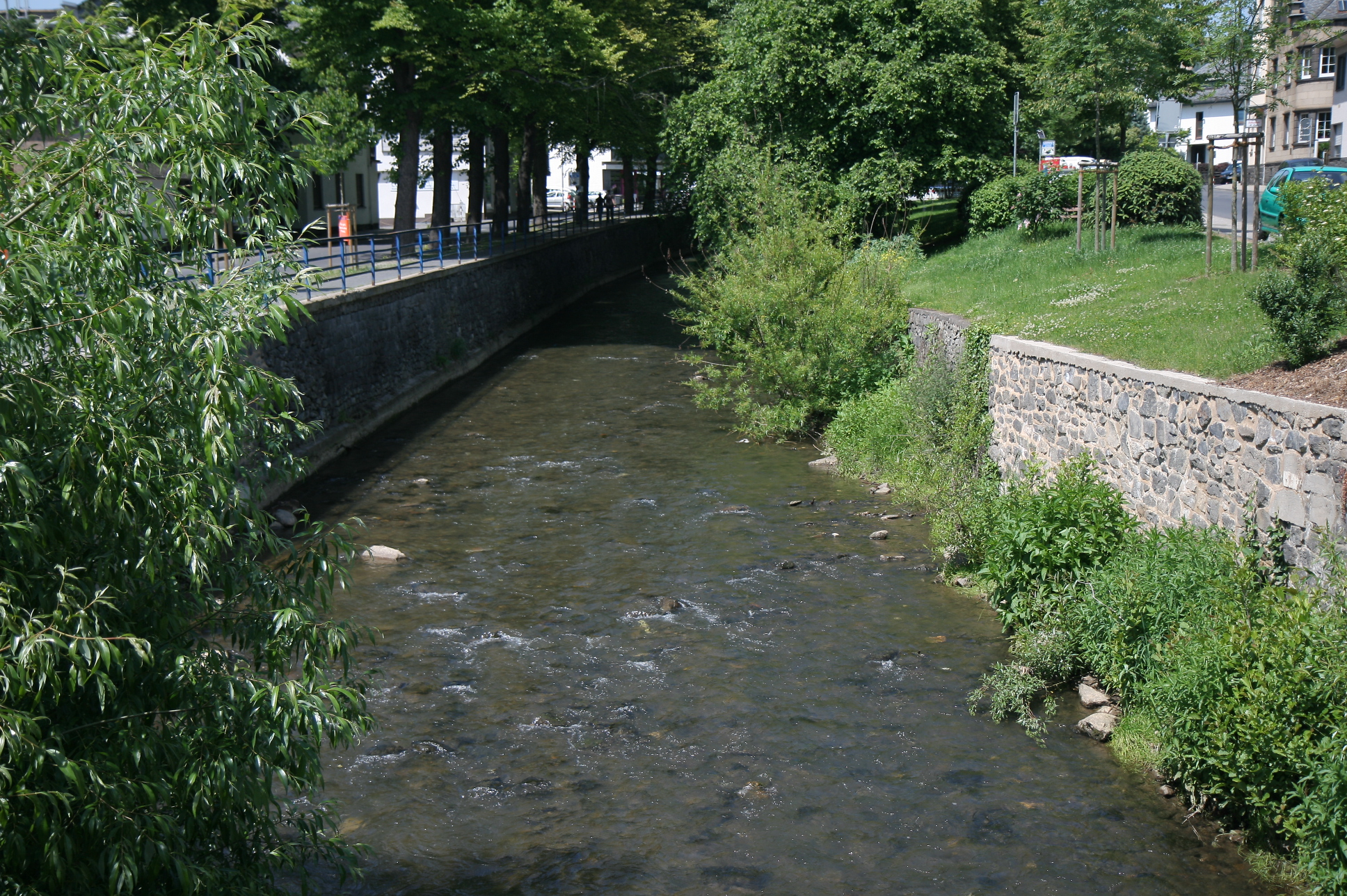 Fluss Nette in Mayen, Wasserpförtchen.